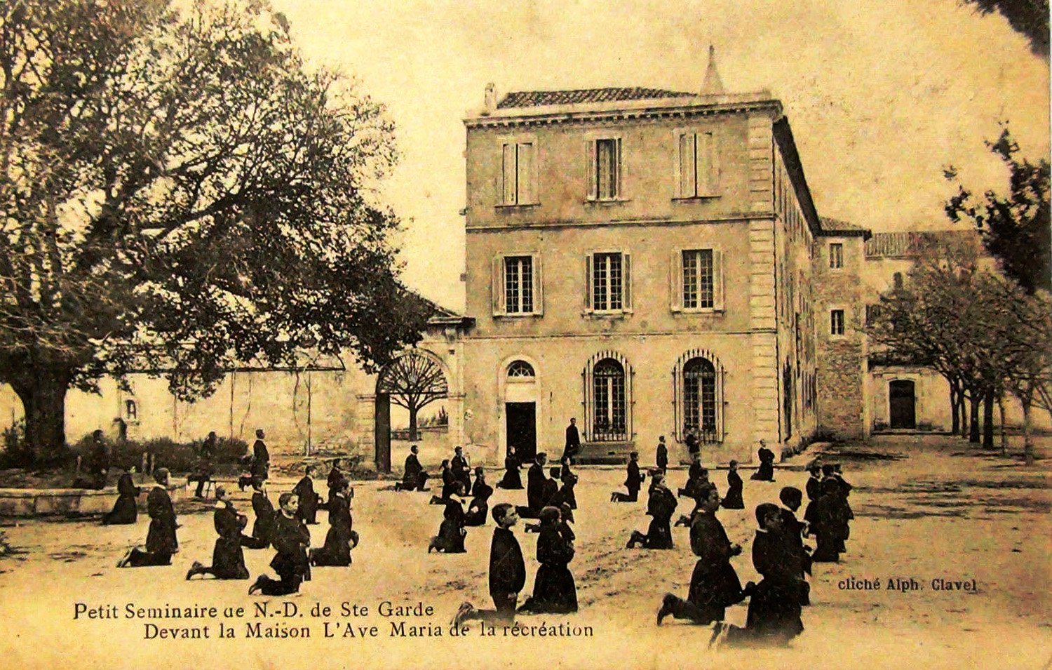 L'Ave Maria des séminaristes